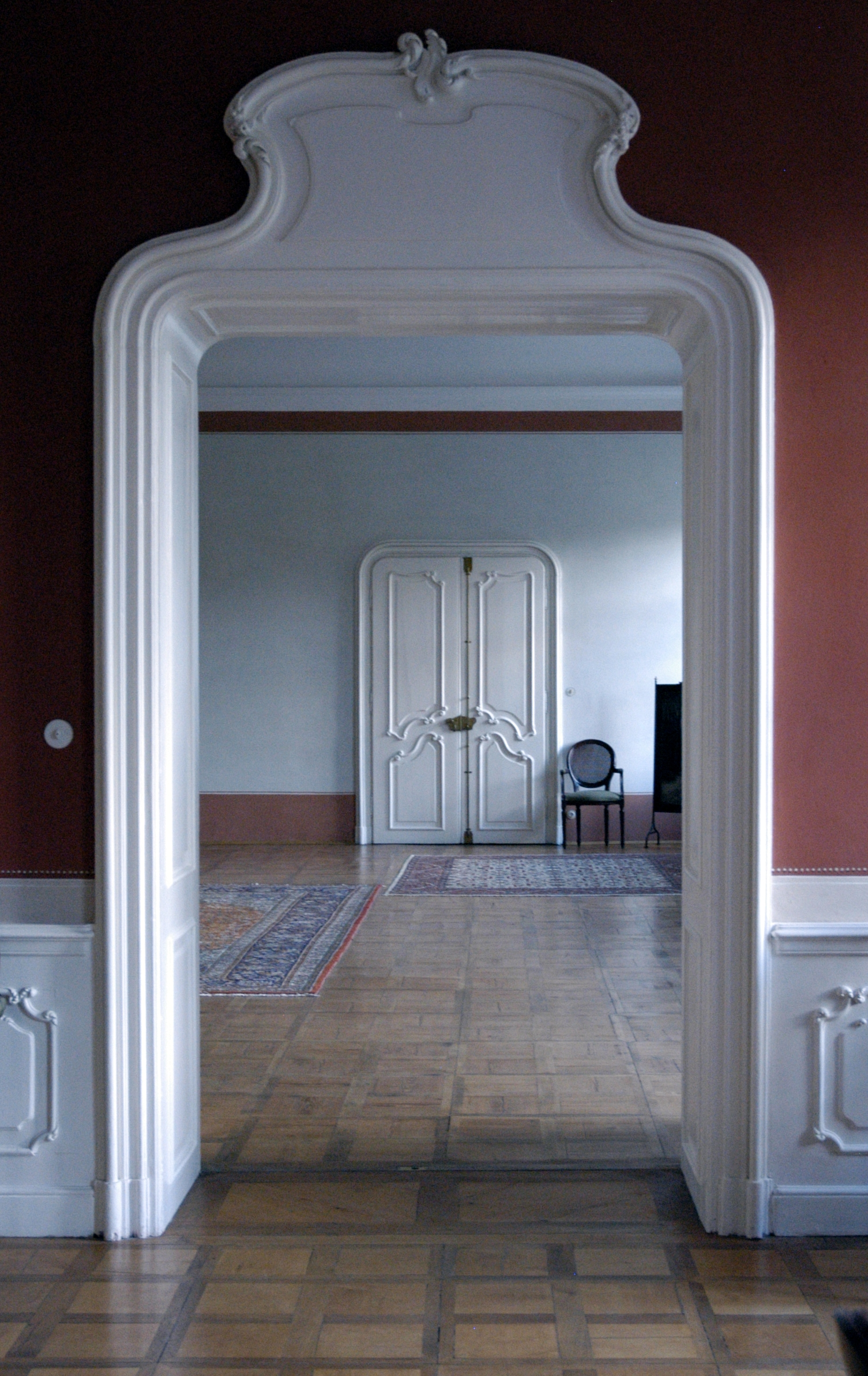 Schloss Schrattenthal Türrahmen